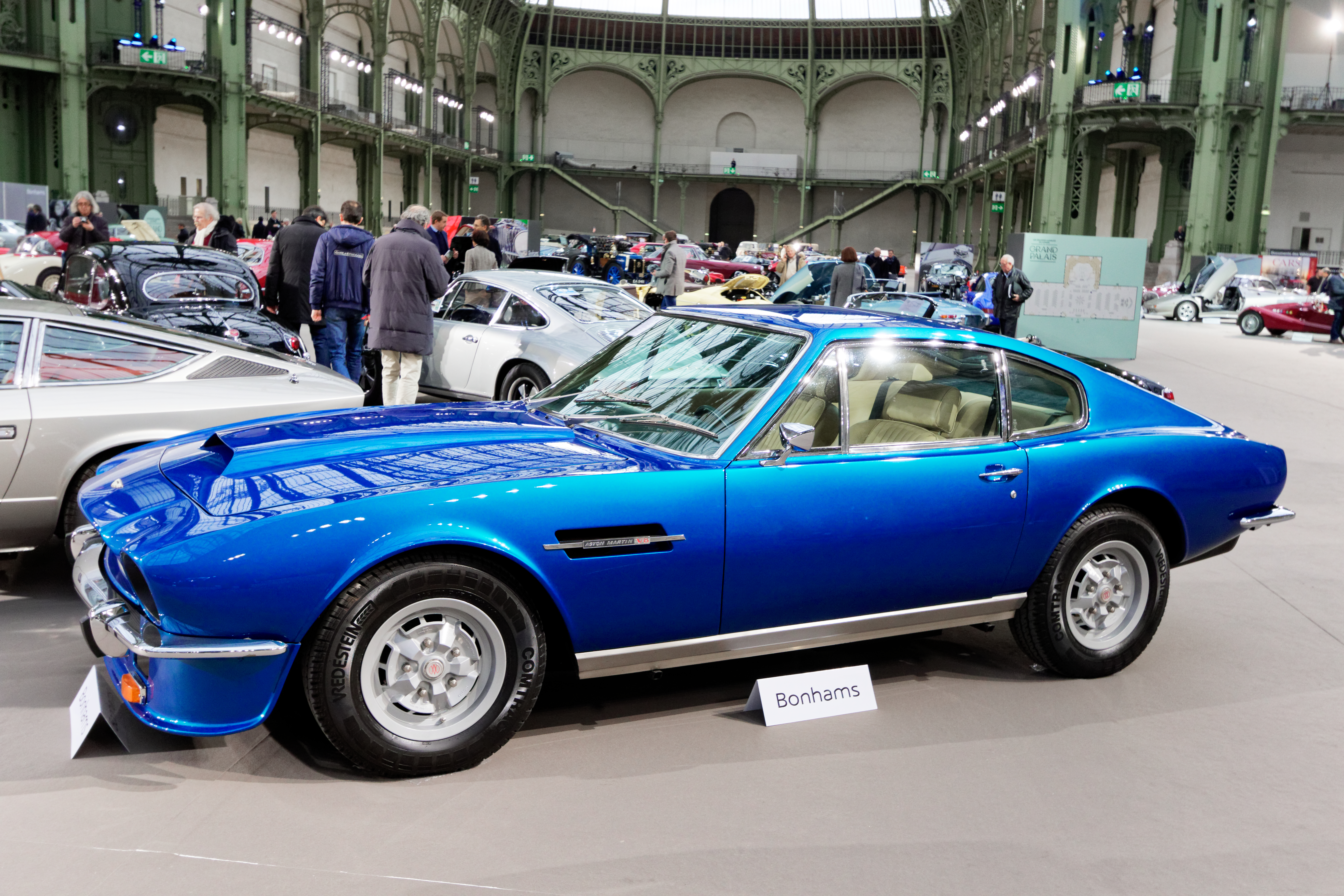 Un des véhicules présenté lors de la vente aux enchères Bonhams 2017 au Grand Palais de Paris.